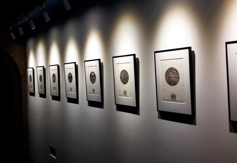 Серия офортов "Босхиана" художника Александра Аксинина в Арт-центре Иеронима Босха, г. Хертоненбос, Нидерланды